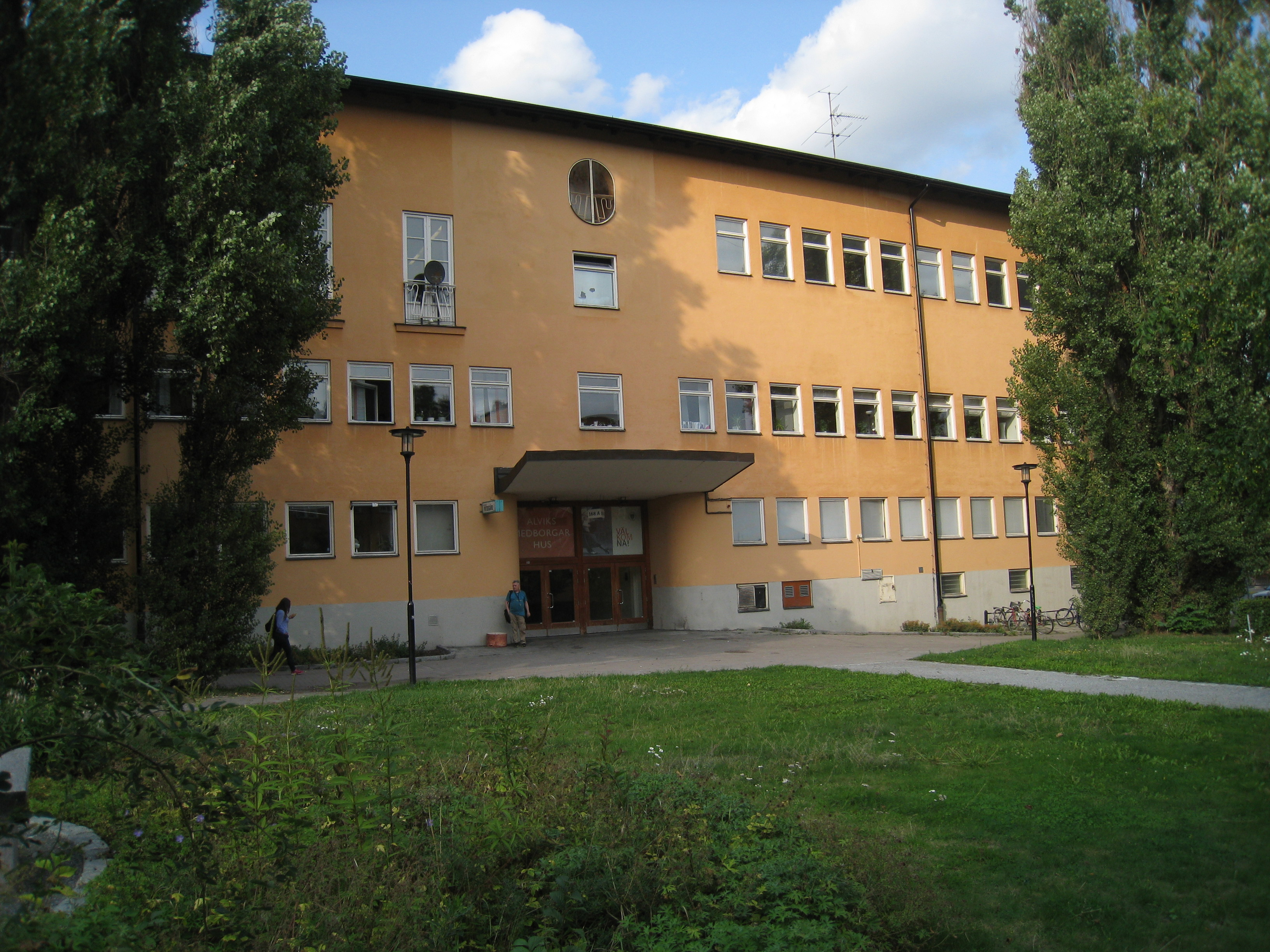 Alviks medborgarhus på Gustavslundsvägen 168-170 i Alvik i Bromma, väster om Stockholm. Huset byggdes åren 1939-1940 och är ritat av arkitekt Thure Bergentz. Byggmästare var Anders Dunder.